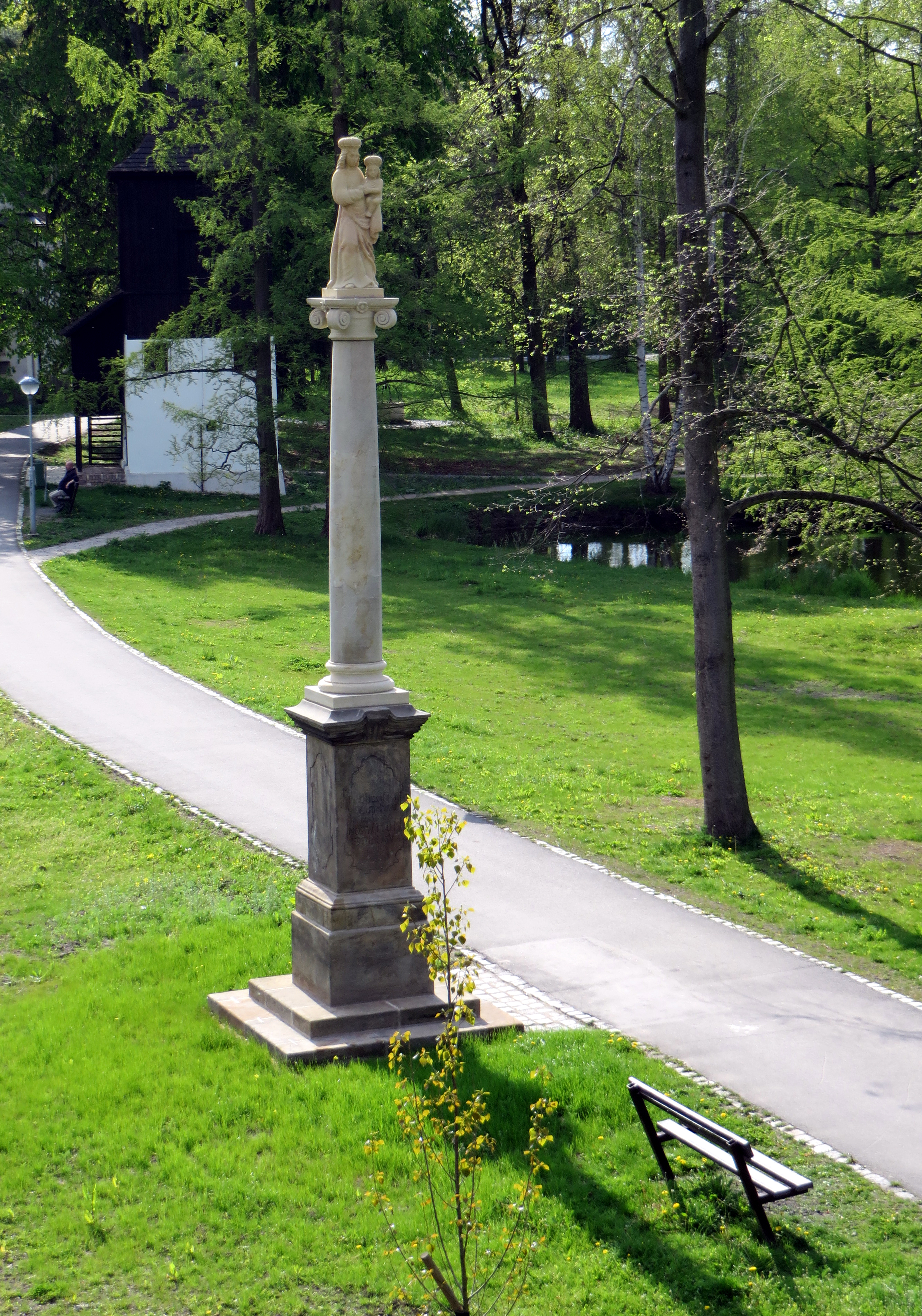 Sloup se sochou Panny Marie Svatohorské po opravě.